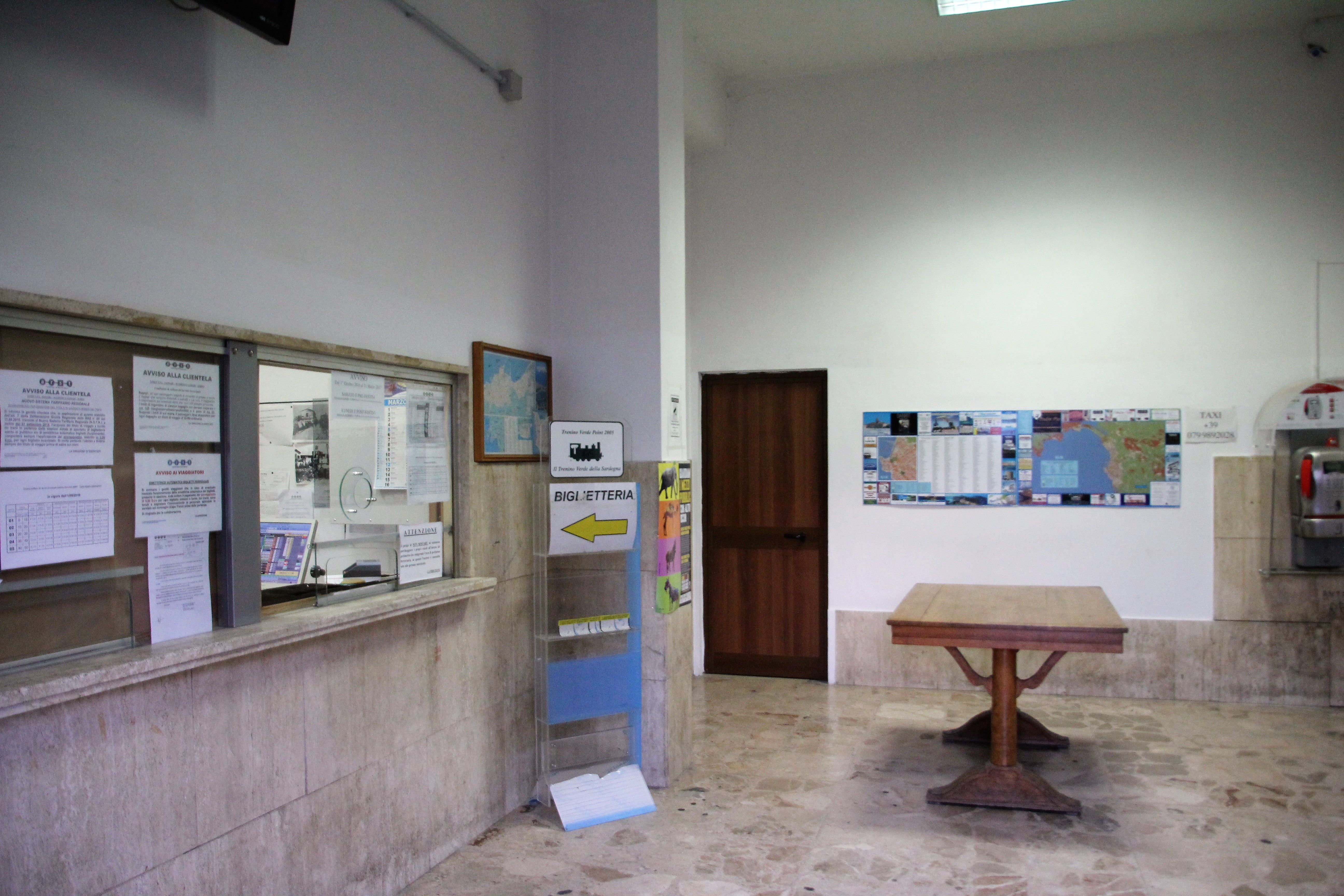 Alghero, stazione ferroviaria